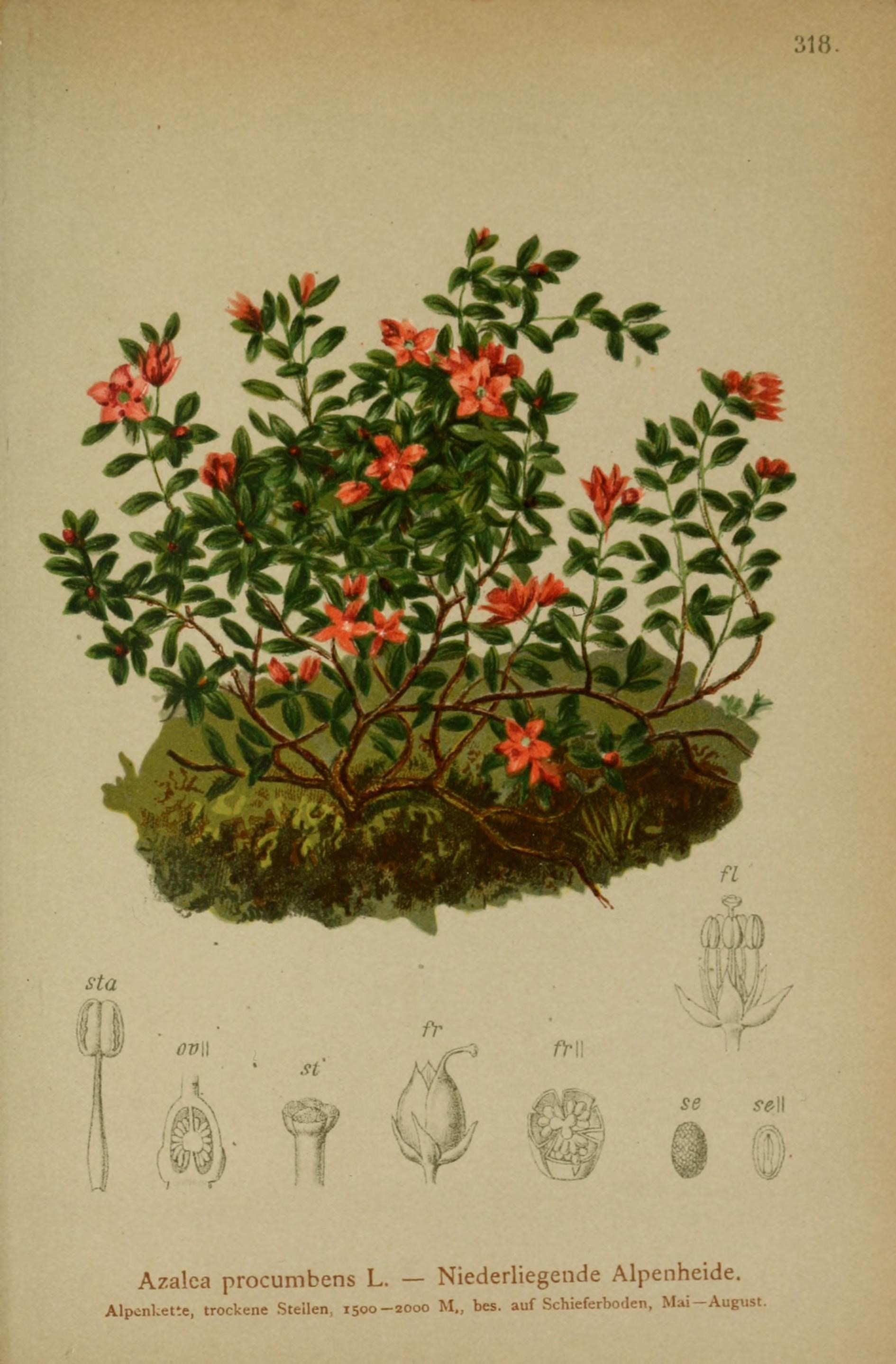 ii8. s-ta 0V\ A st VI frW se y^l Azalca procumbens L. — Niederliegende Alpenheide. Alpcnkette, trockene Steilen, 1500-2000 M„ bes. auf Schieferboden, Mai-Aup.st.